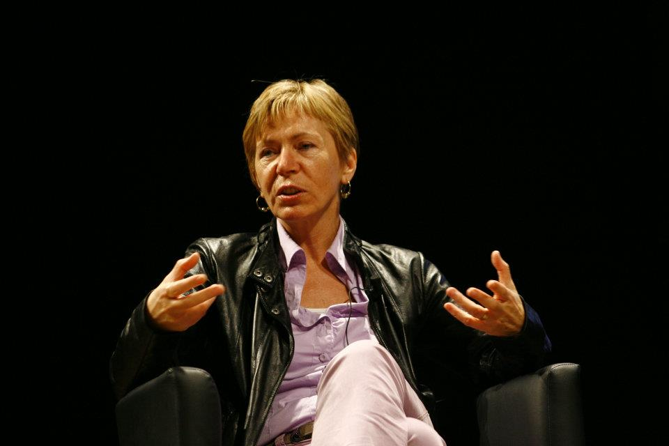 Milena Gabanelli al Festival Internazionale del Giornalismo di Perugia.